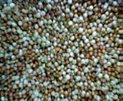 Finger millet